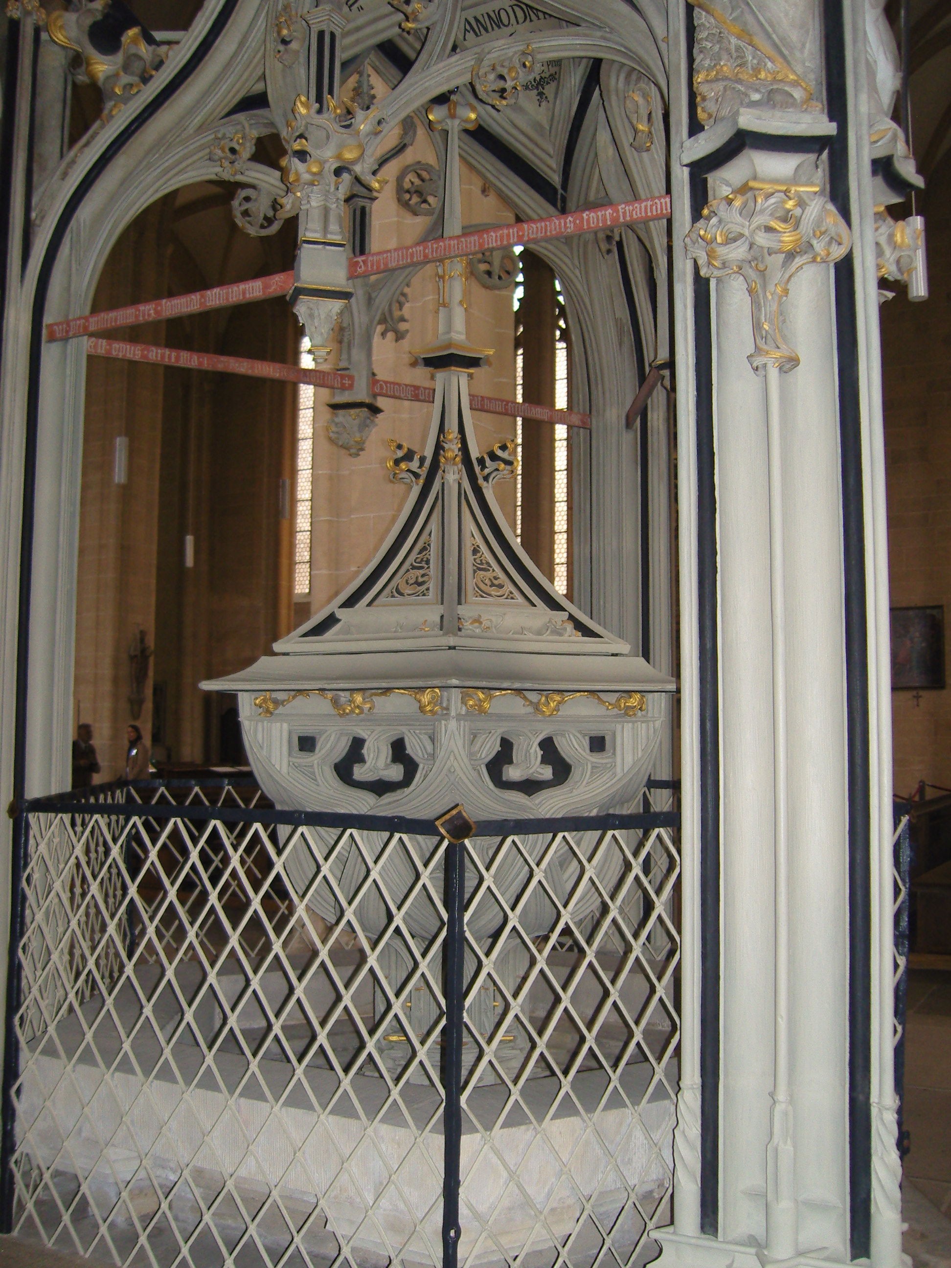 Taufbecken in der Severikirche in Erfurt